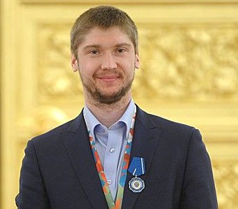 Сергей Бобровский в Кремле 2014